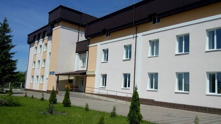 Лікарня